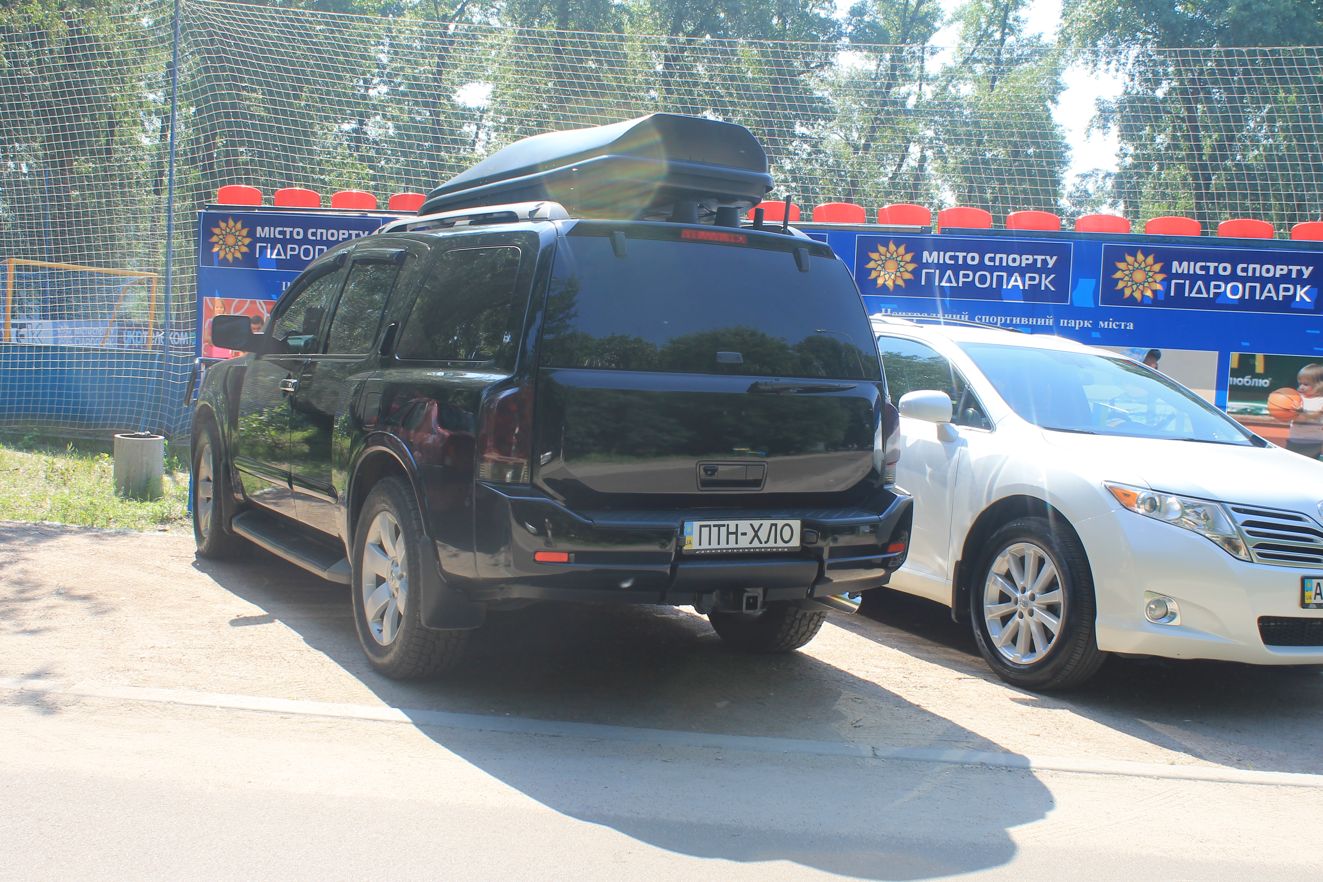 Автівка з номерними знаками, що натякають на Путіна - Хуйла